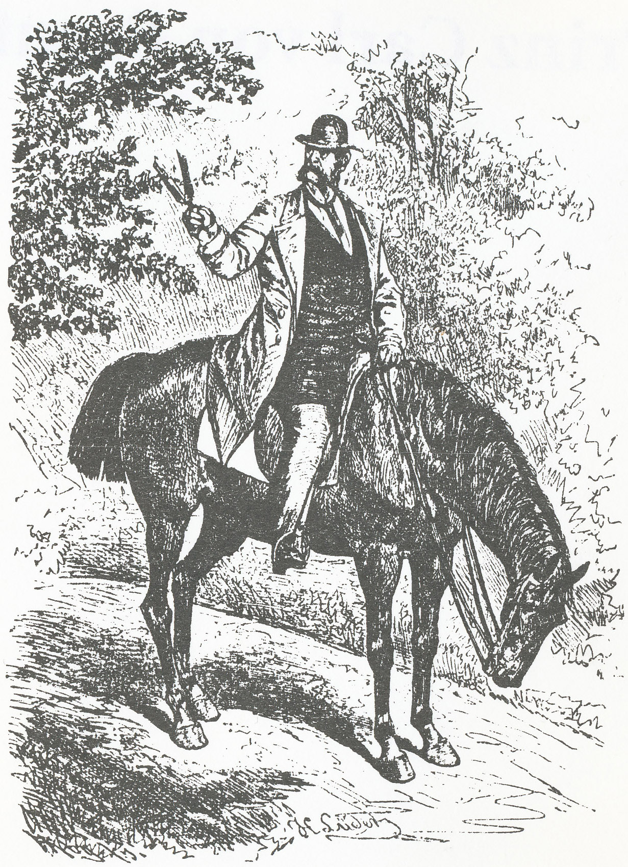 Prinz Carl bei der Baumpflege im Glienicker Park, Stich von H. Lüdicke, um 1880